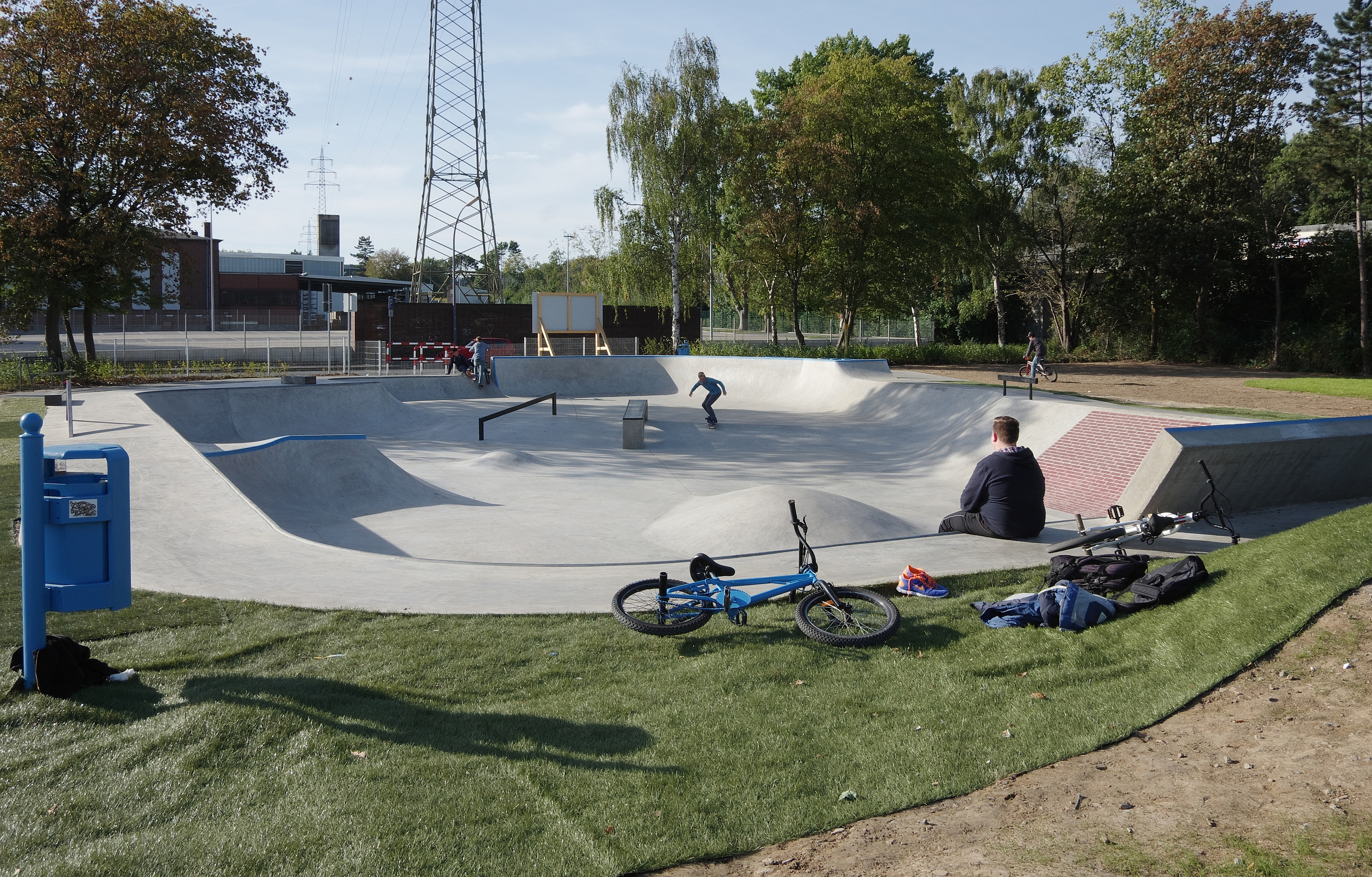 Anlage für Rollsportgeräte Unna an der Hansastraße